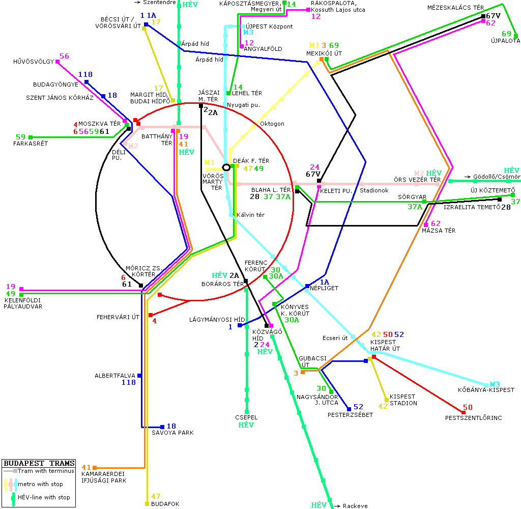 Het tramnetwerk van Boedapest, situatie van 2006.